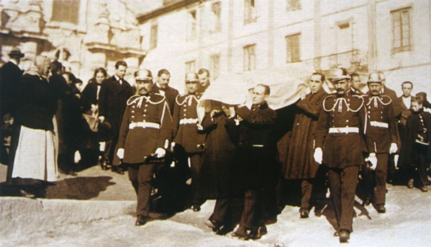 Enterro de Manuel Murguía